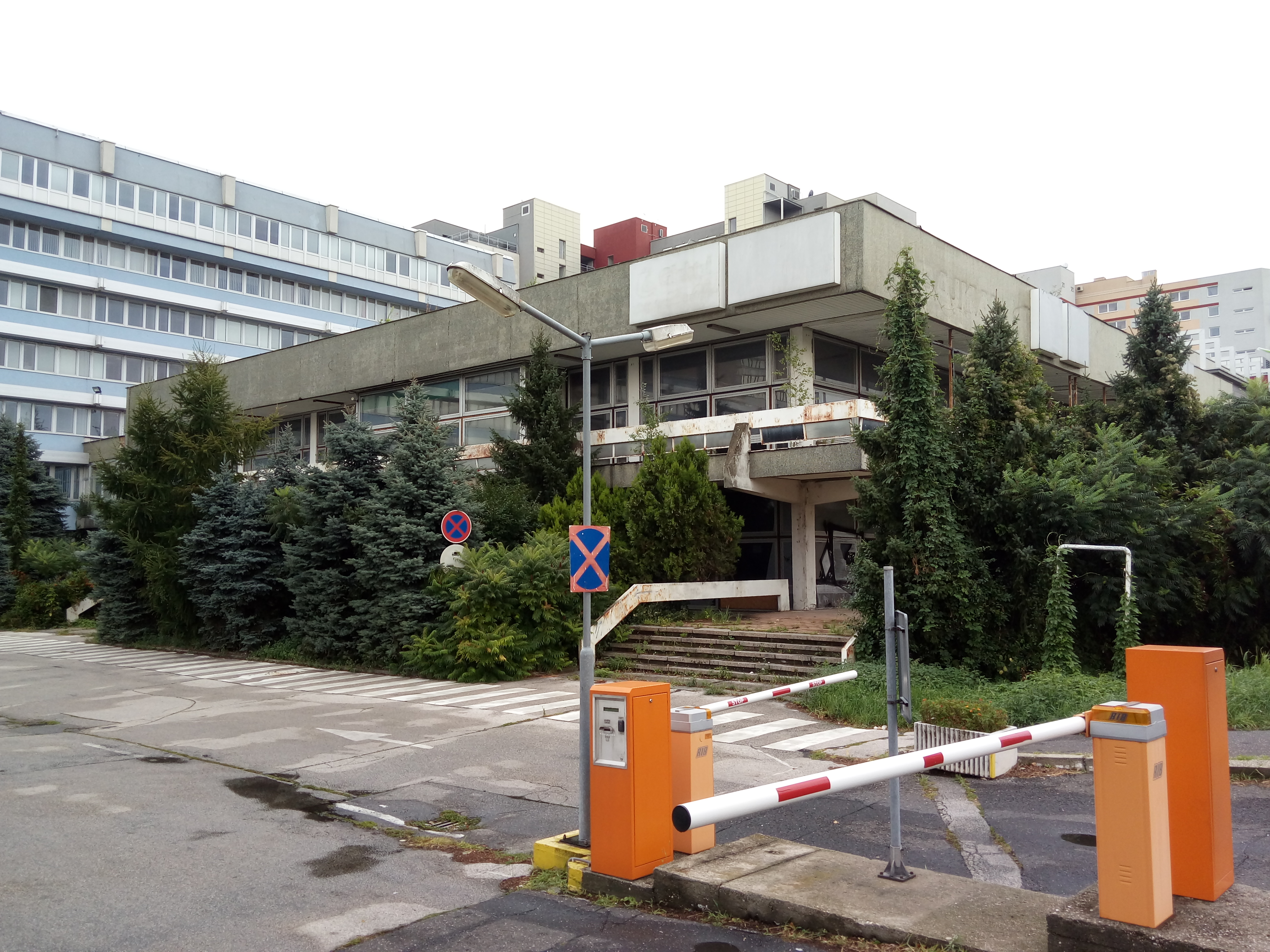 Bajkalská 27, Ružinov, Bratislava